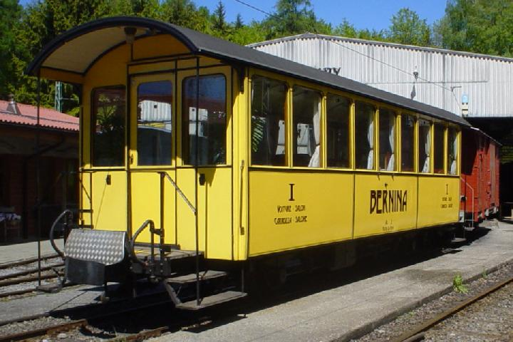 Salonwagen As2 2 der Rhätischen Bahn bei der Museumsbahn Blonay-Chamby in Chaulin im Jahre 2005.